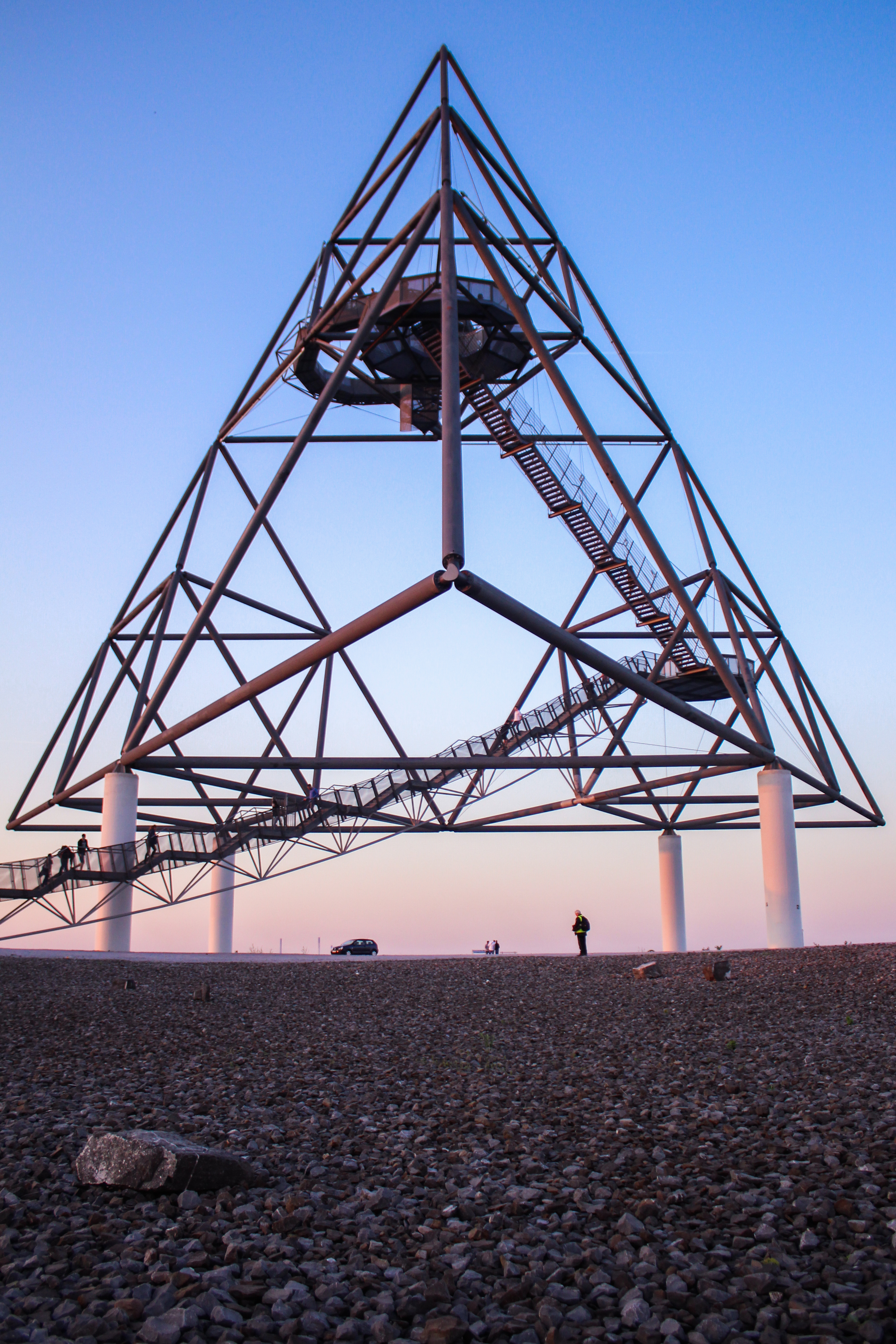 Tetraeder in Bottrop 2019